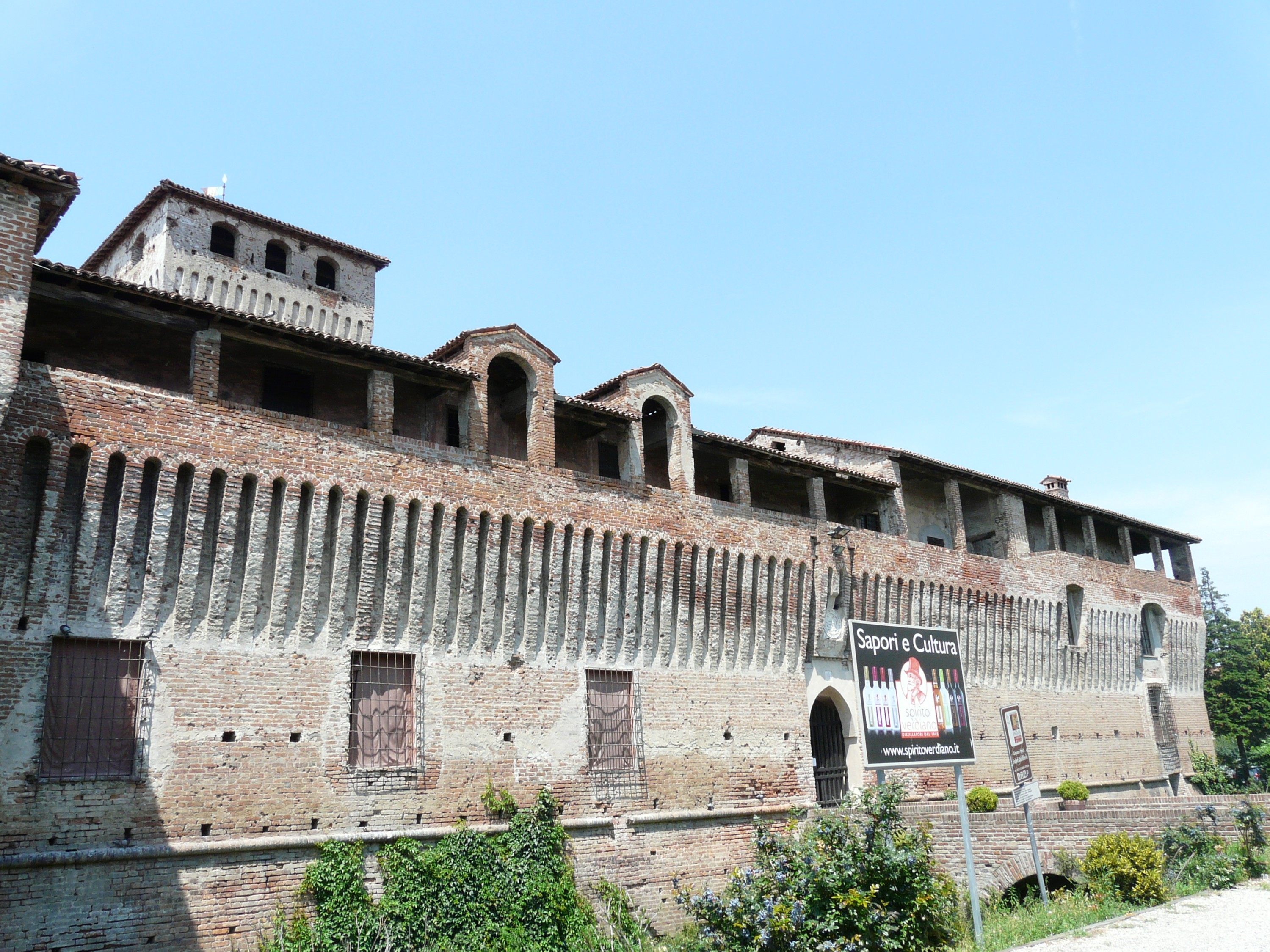 Castello di Roccabianca, Emilia-Romagna, Italia